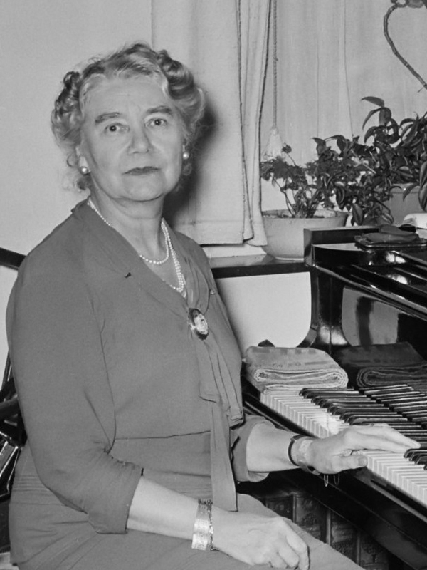 Bertha Seroen 70 jaar (zangeres) 17 november 1952